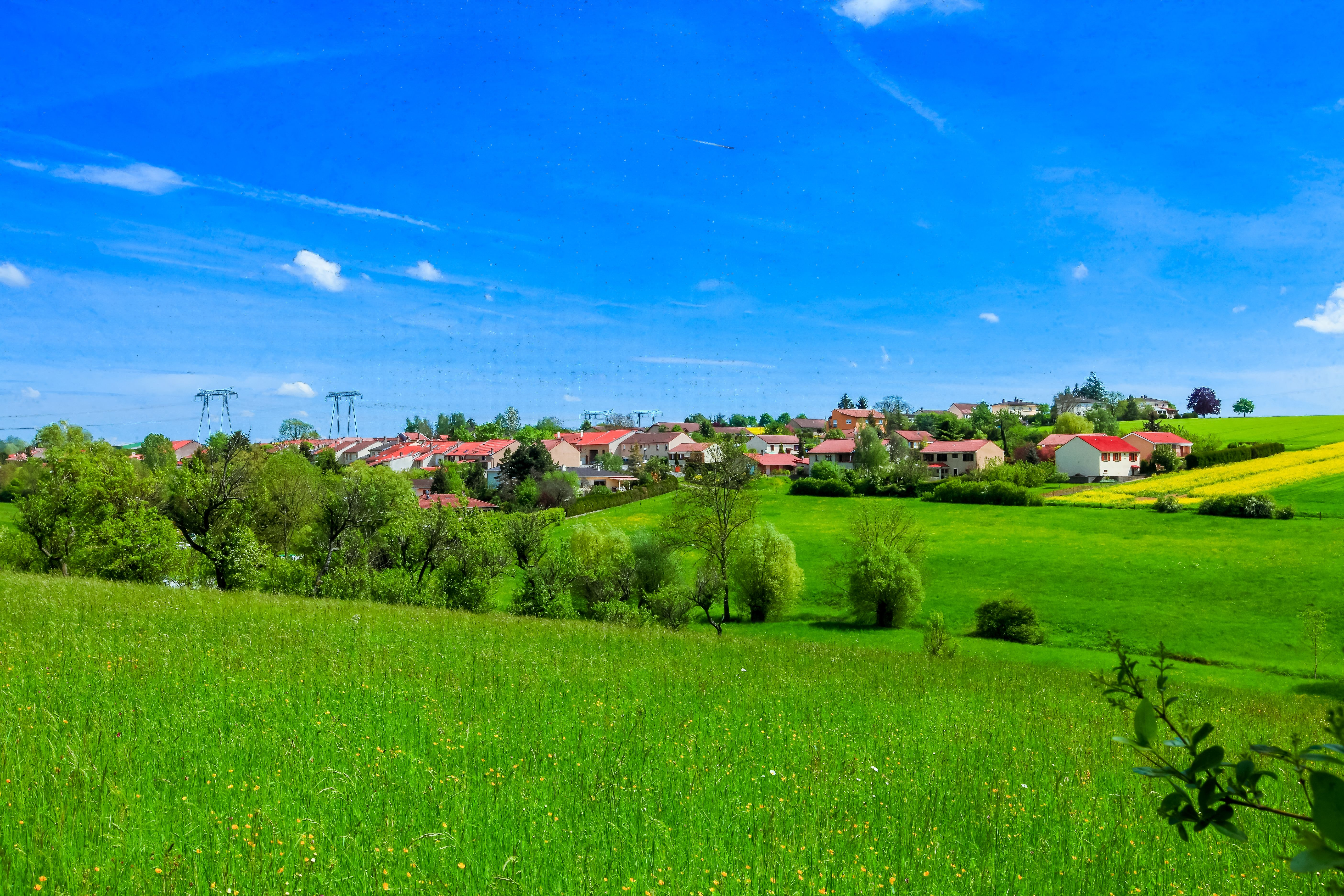 Village de Coincy, vue sur les rues de la Folie depuis les vignes, 2012